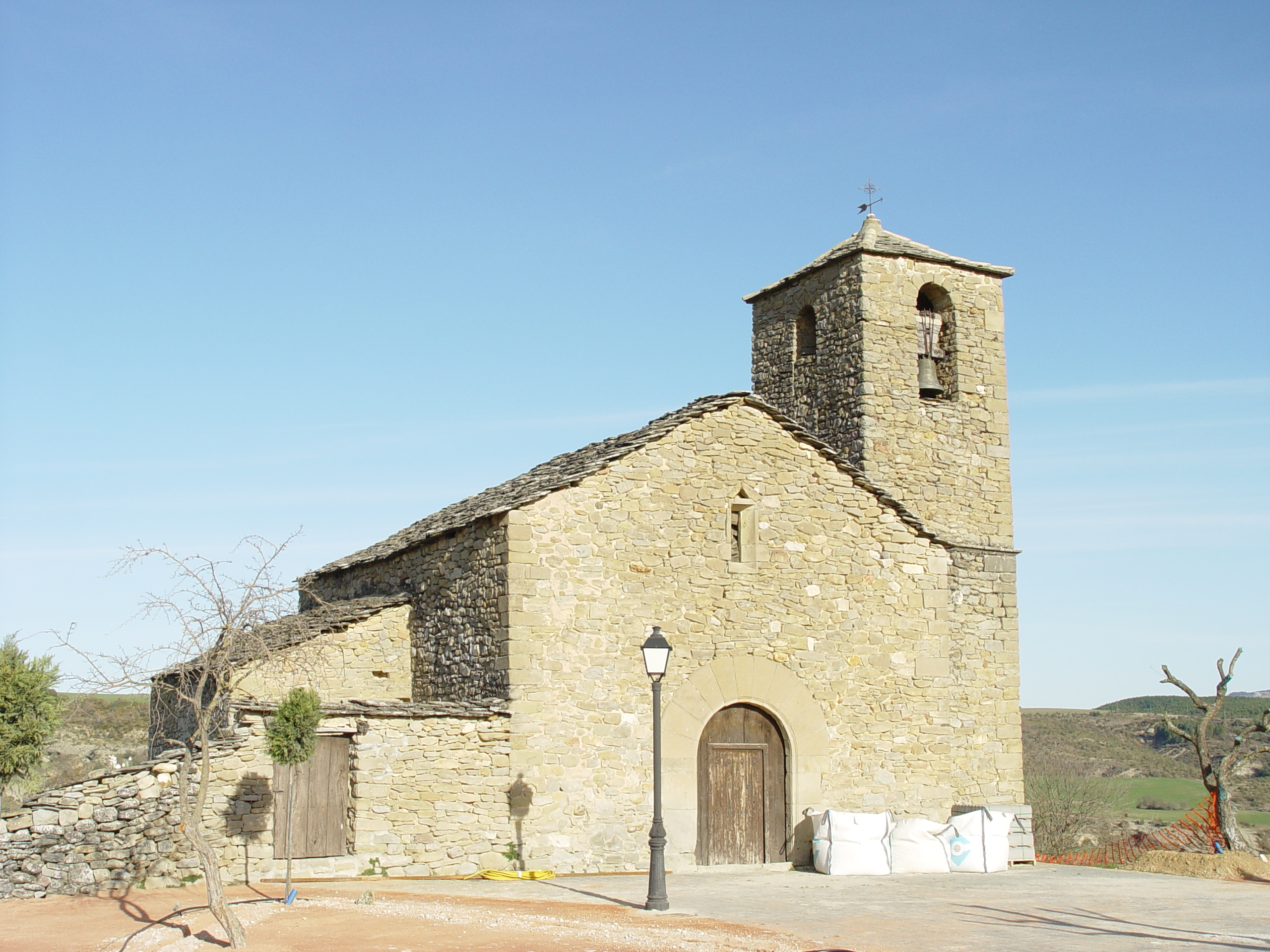 Església de l'Assumpció d Lliterà (la Ribagorça)